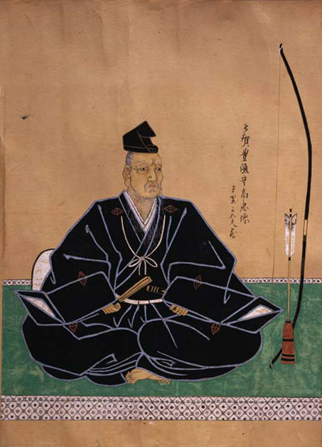 多賀高忠 像。松平定信 作（江戸時代 寛政七年）。東京国立博物館 蔵。 Takatada Taga. Writen by Sadanobu Matsudaira (1795). Tokyo National Museum collection.